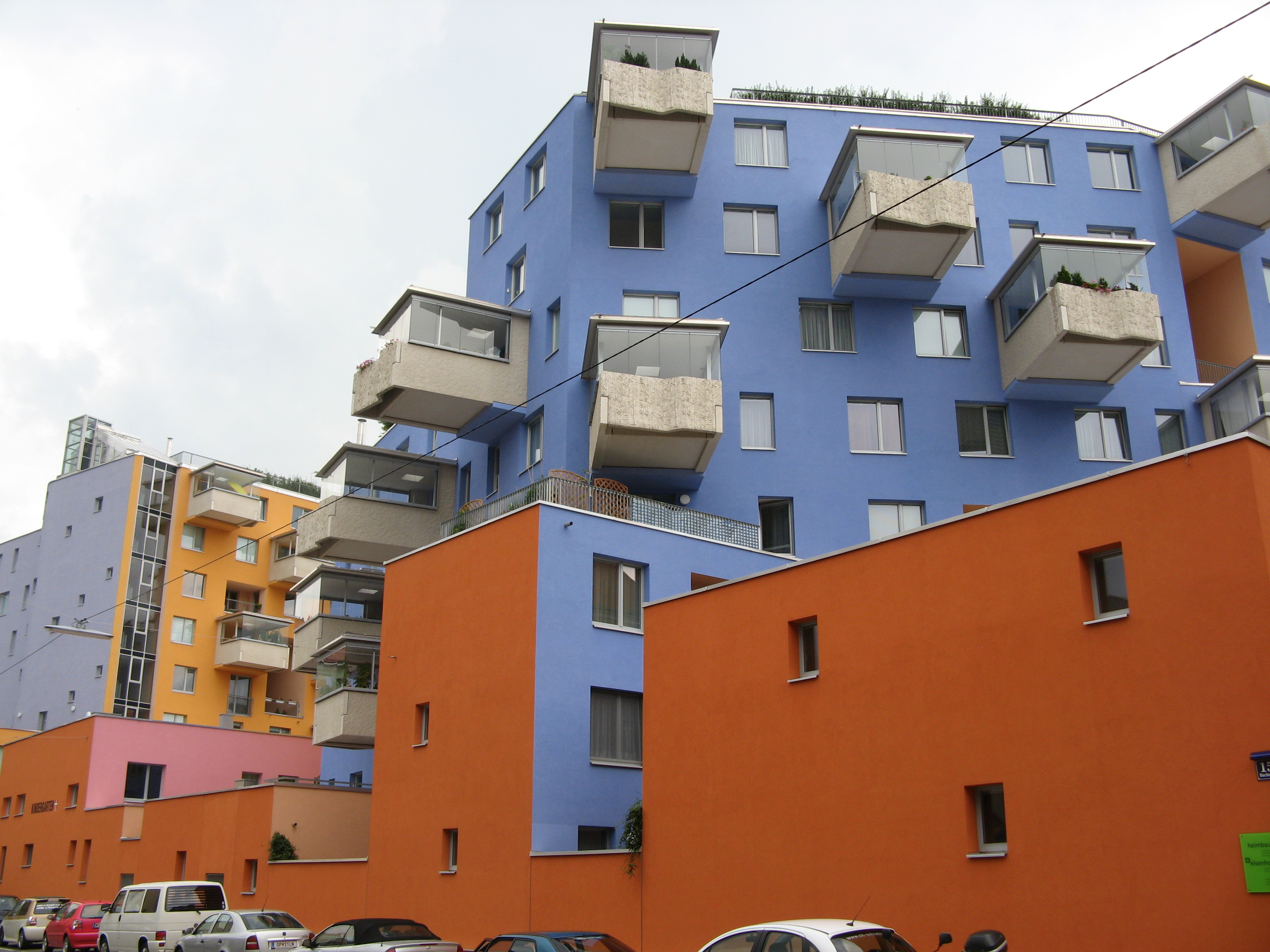 Buchengasse 155-157, Wien-Favoriten